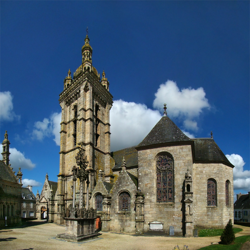 Église Notre-Dame, Saint-Thégonnec, Finistère, Bretagne, France.